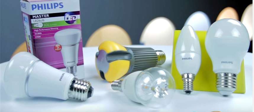 Bombillas de LED de la marca Philips